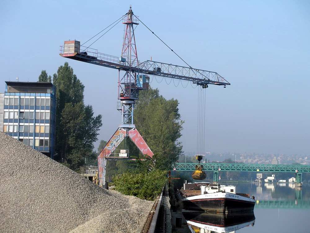 Pískovna v Praze-Holešovicích